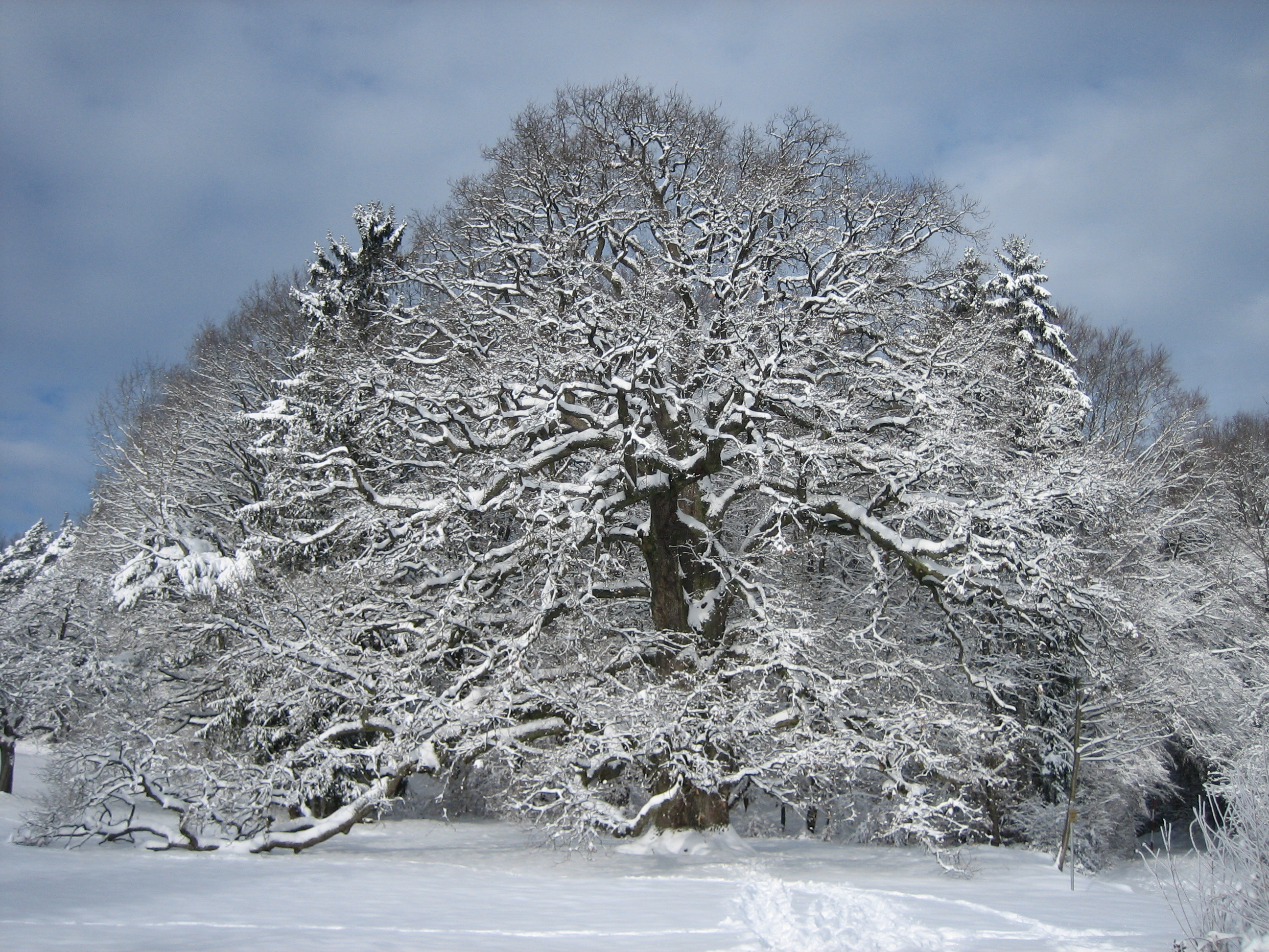 Walddorfhäslach-Häslach Naturdenkmal Sulzeiche im Schnee